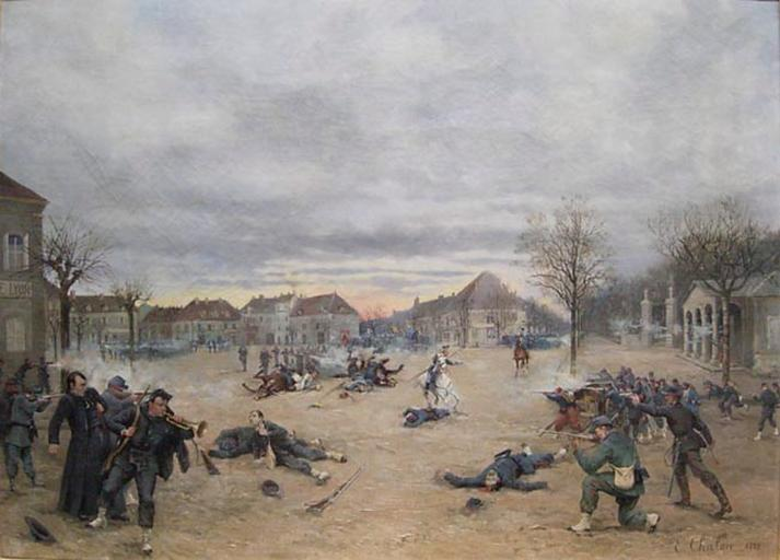 Tableau peint en 1889 par Eugène CHALON. Il représente l'assaut mené par les Prussiens sur la ville de Dole (Jura), le 21 janvier 1871. Il est actuellement conservé au musée des Beaux-Arts de Dole.